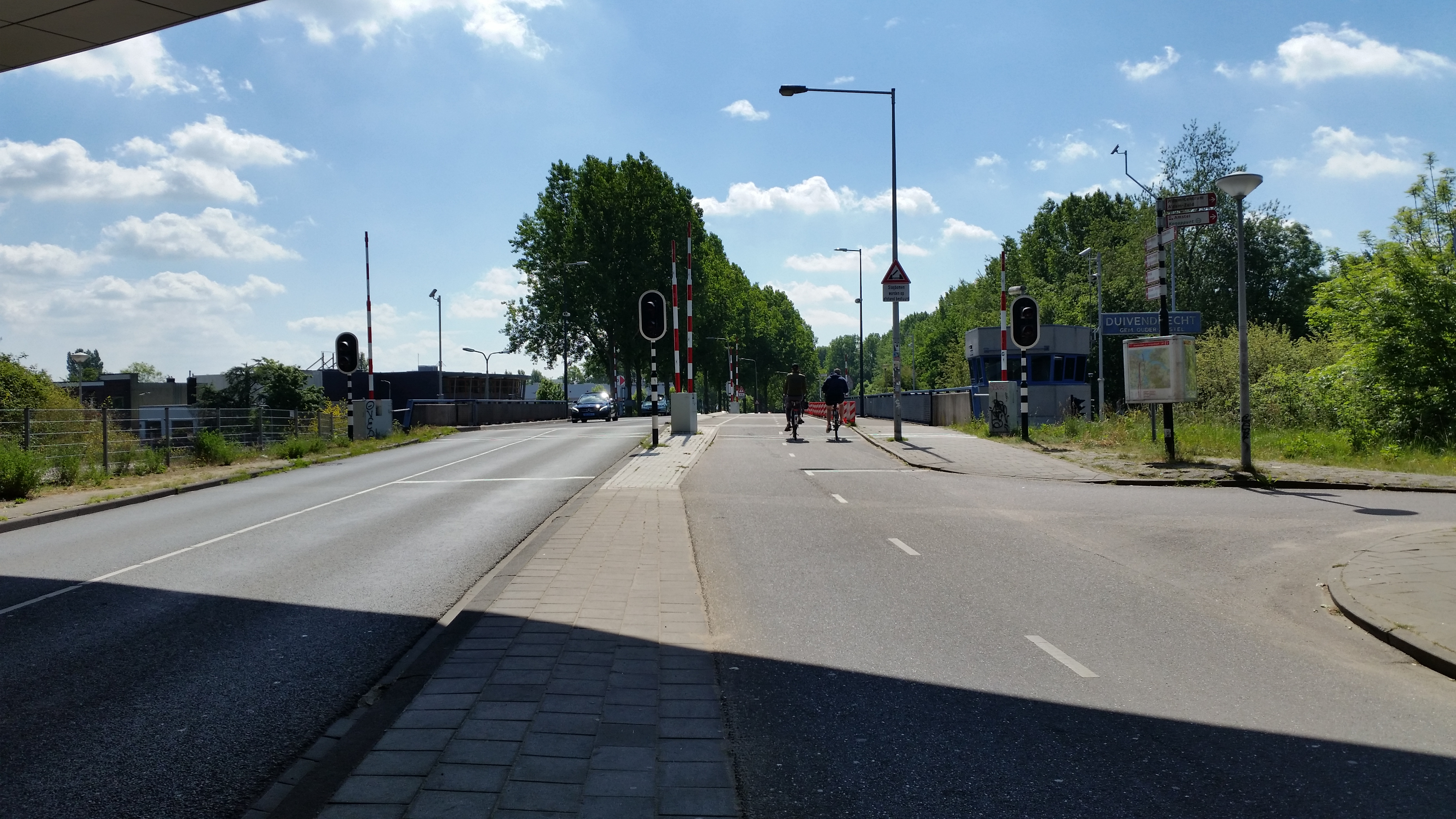 Impressie van de 1988-versie van de Duivendrechtsbrug (brug 1267) op de grens Amsterdam en Ouder-Amstel